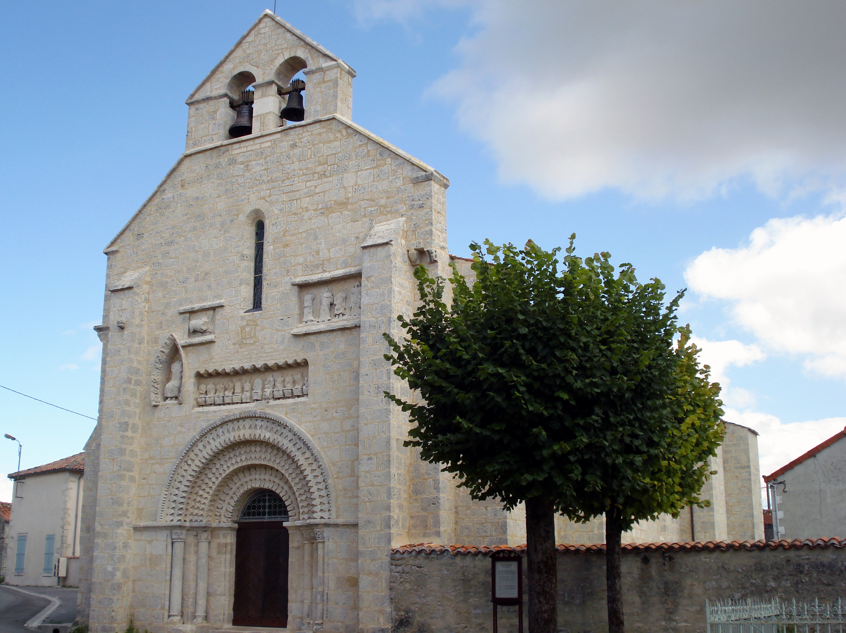 L'église de Fontaine-Chalendray